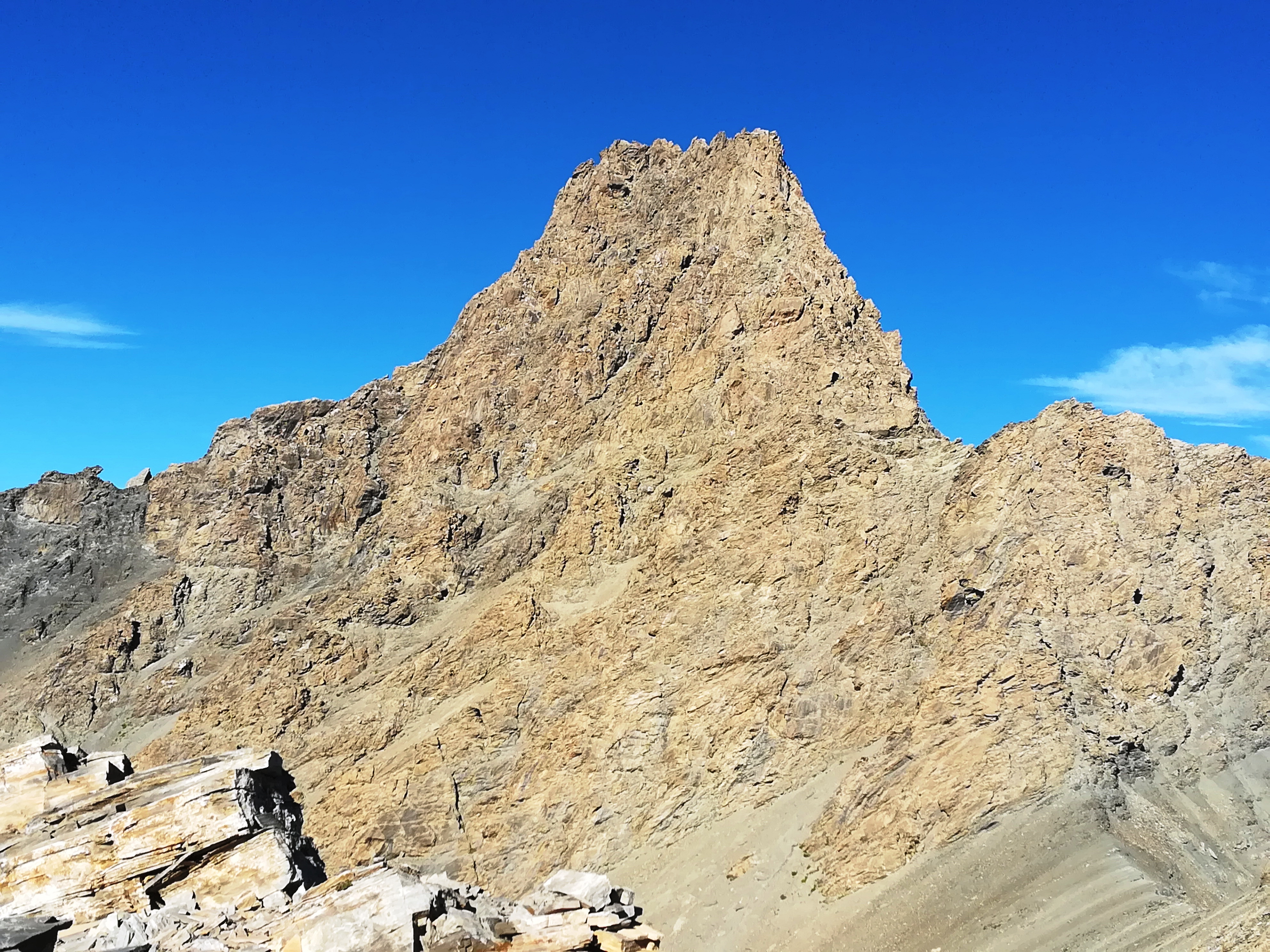 La Tête de l'Homme vista nel sul versante est (versante italiano)